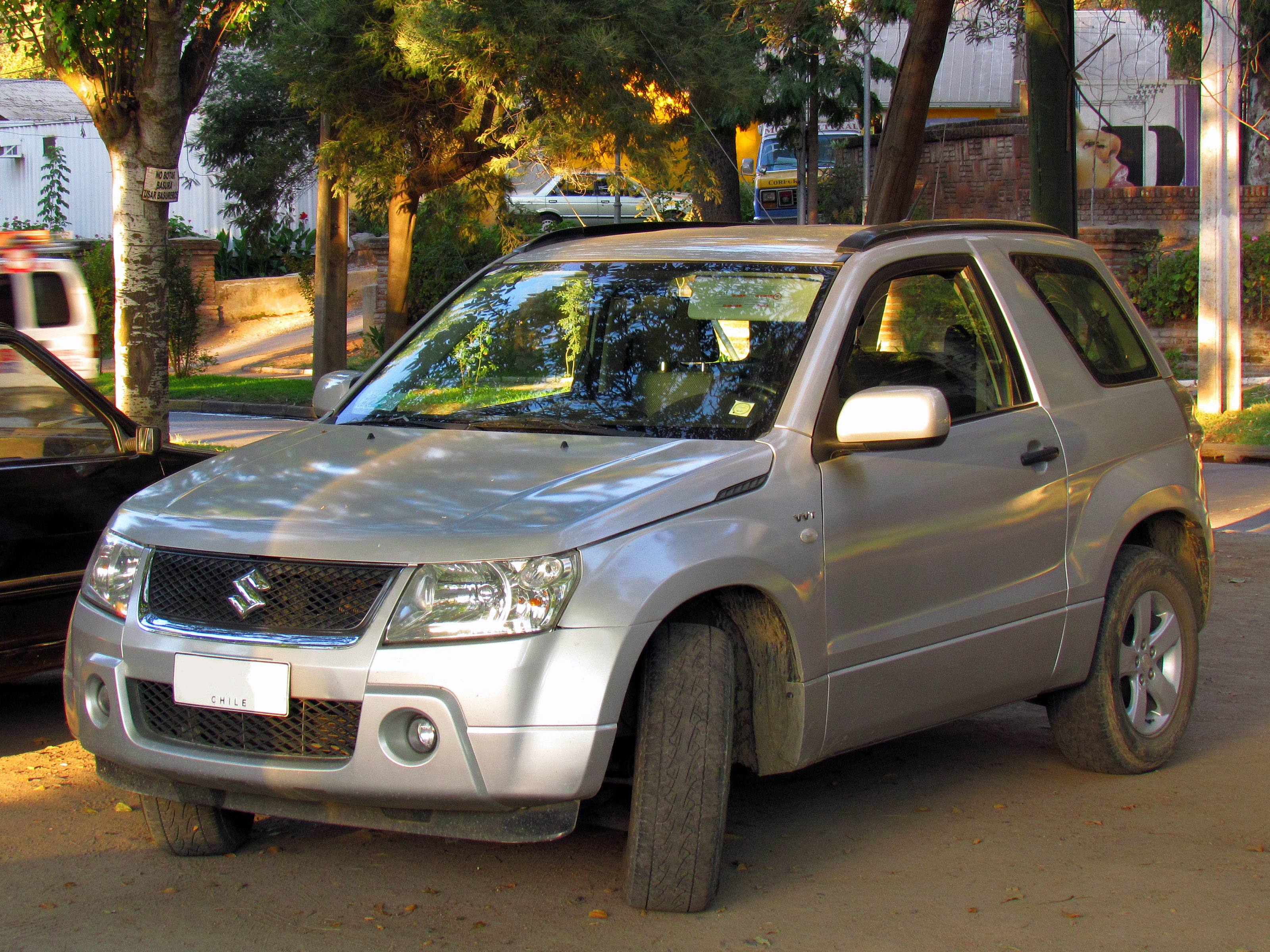 Suzuki Grand Vitara 1.6 GLX Sport 2007